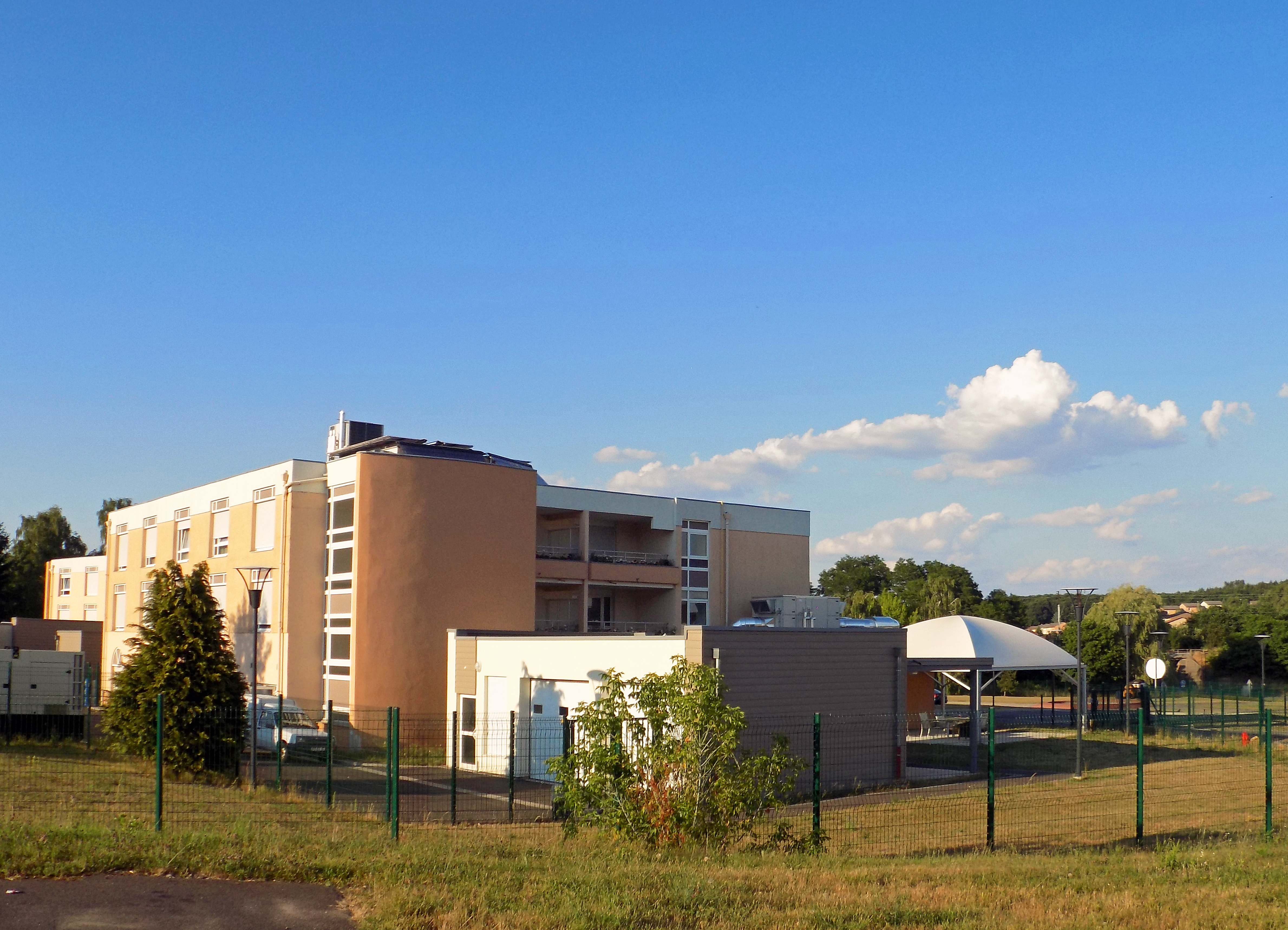 La Résidence du Parc de Carling (Moselle). Elle est située 4 rue du Puits Max. C'est une maison d'accueil EHPAD pour personnes âgées, de 89 lits, dont 14 lits pour les personnes atteintes de maladie d'Alzheimer. L'unité Alzheimer a été mise en service début 2013 dans le cadre de l'agrandissement de 61 à 89 lits.